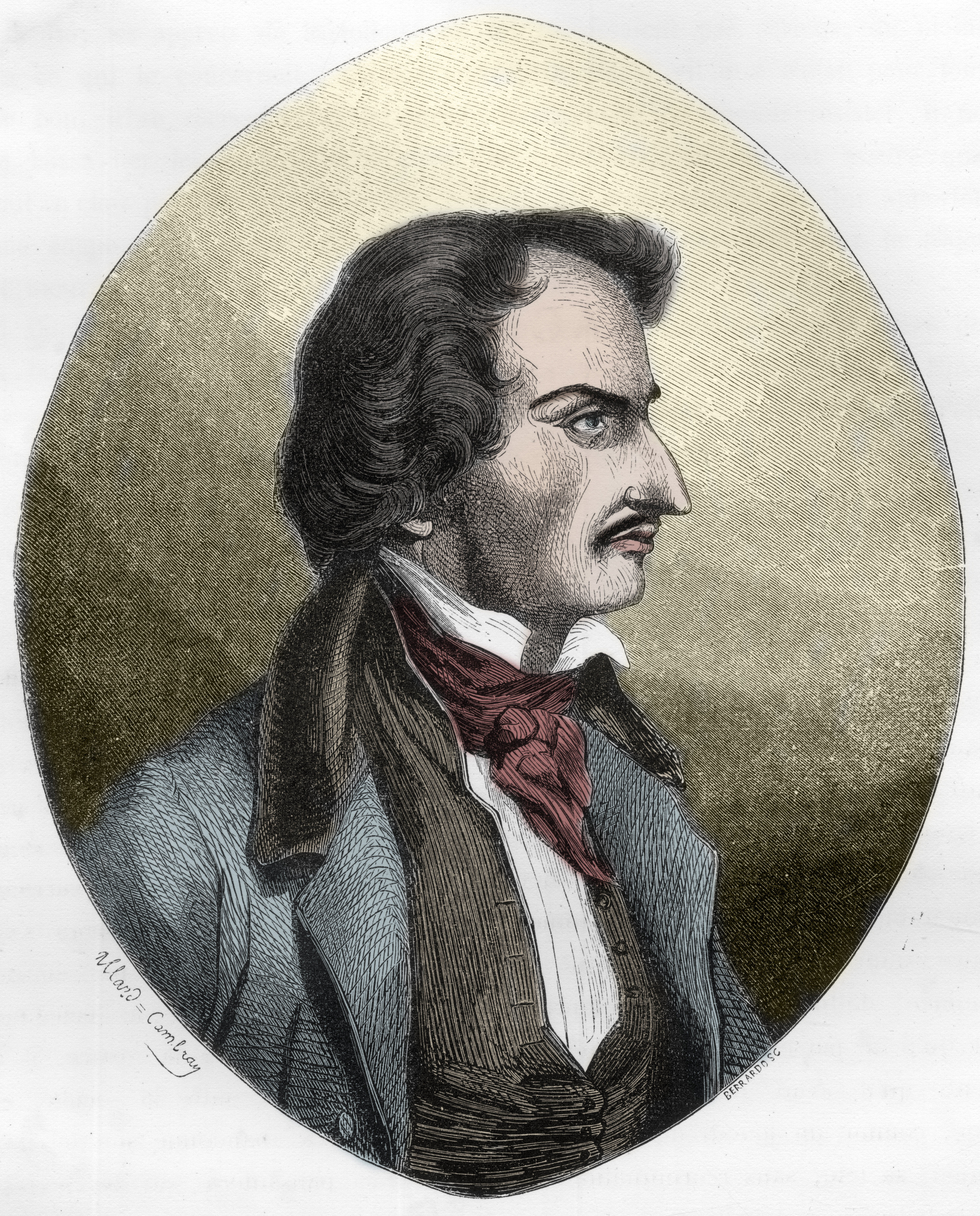 Pierre-François Lacenaire